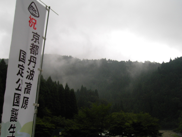 京都丹波国定公園の制定を祝う幟 京都市左京区の丹波高原山間部・桂川源流域付近にて